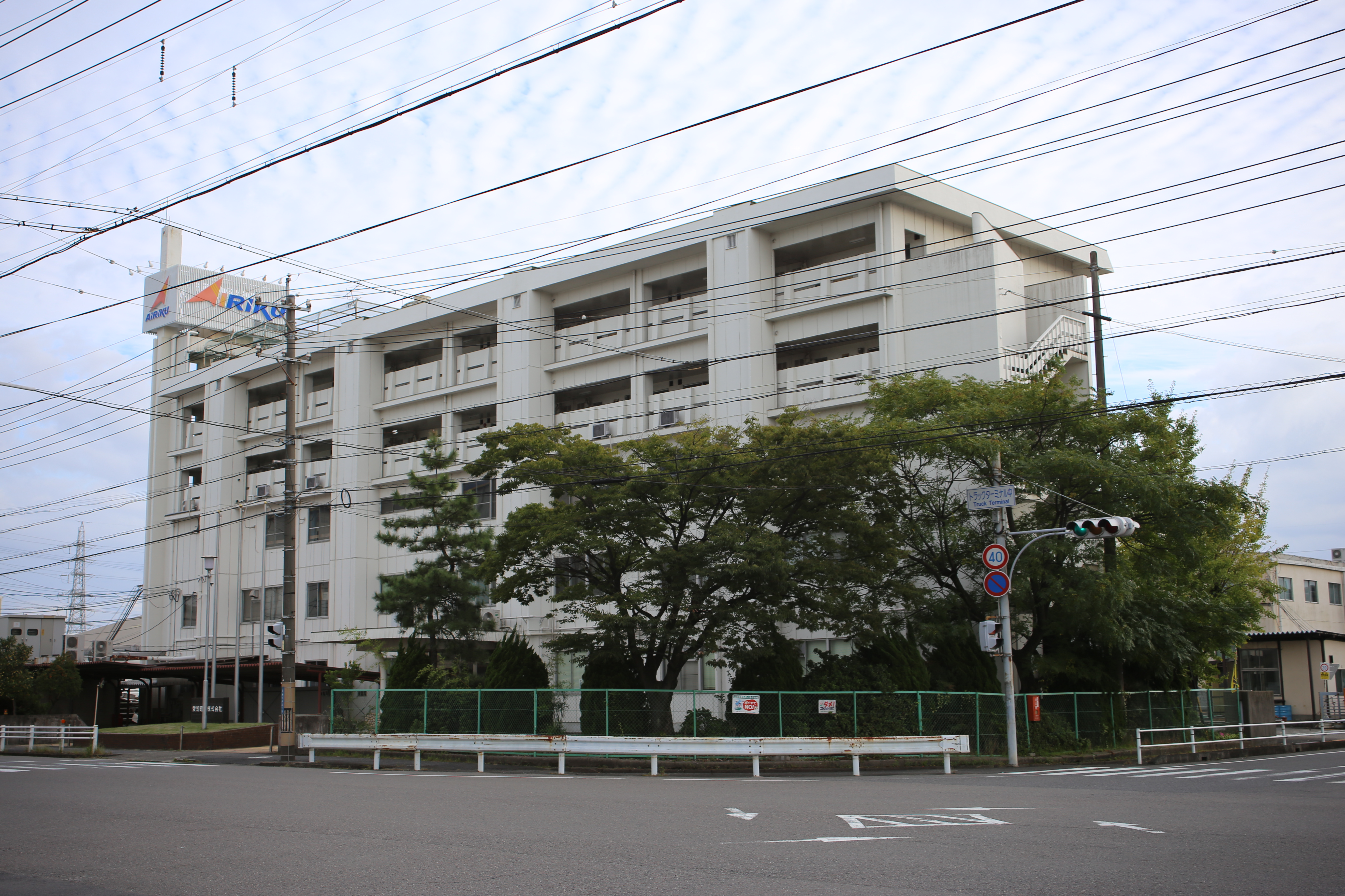 愛知県小牧市の愛知陸運の登記上の本社